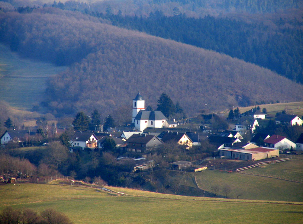 Blick von der Vulcano-Infoplattform auf der Steineberger Ley aus Richtung Westen auf Demerath (Eifel), in der Bildmitte die Demerather Kirche und der Friedhof.